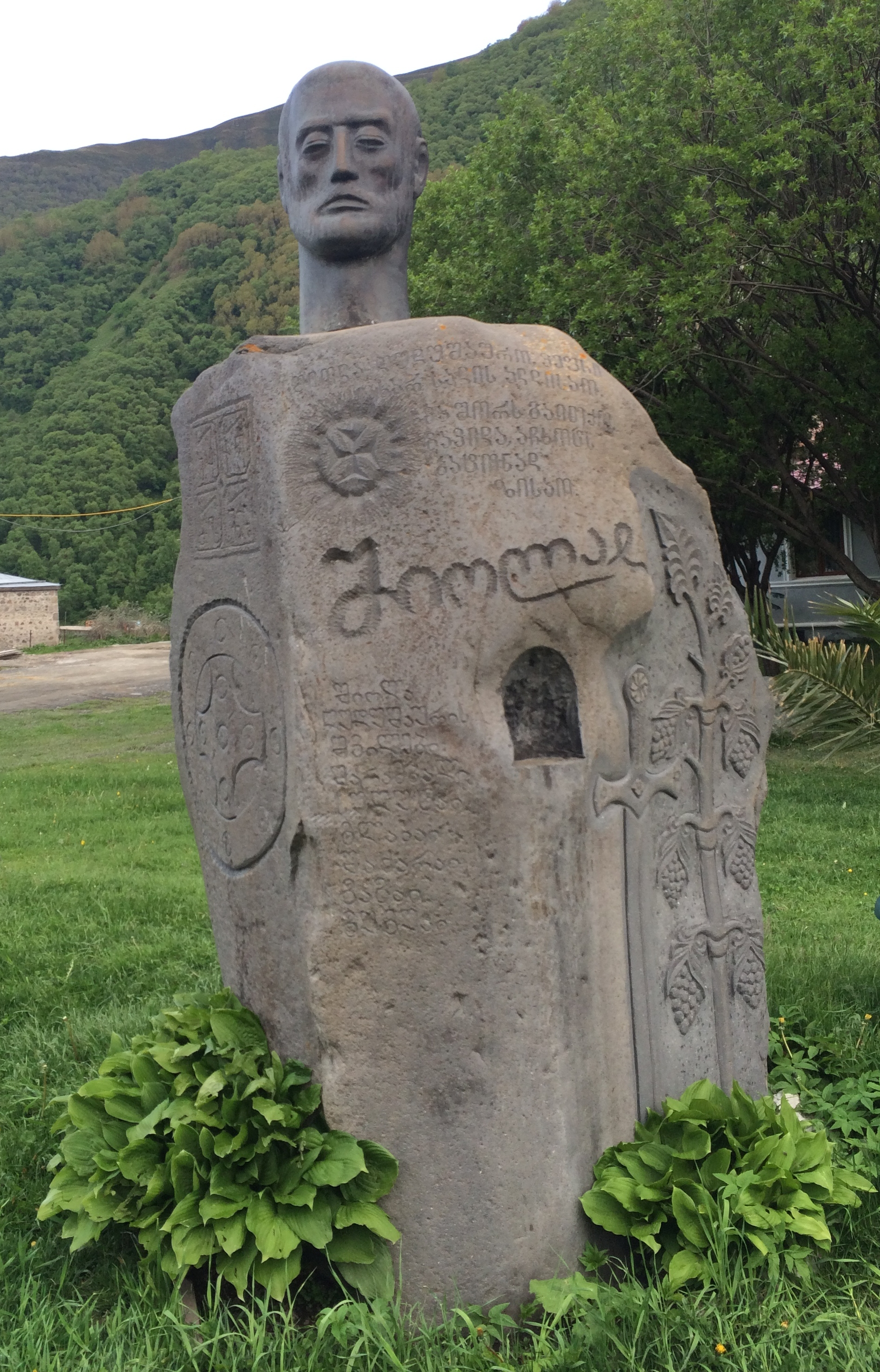 შიოლა ღუდუშაურის ძეგლი